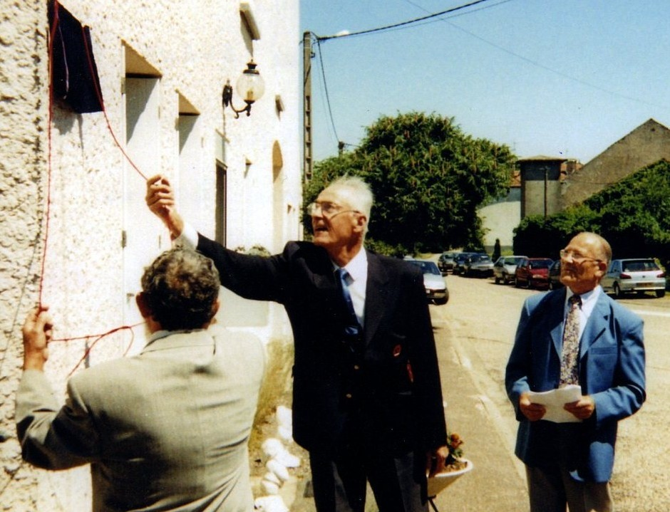 inauguration place Jean Valnet à Molay